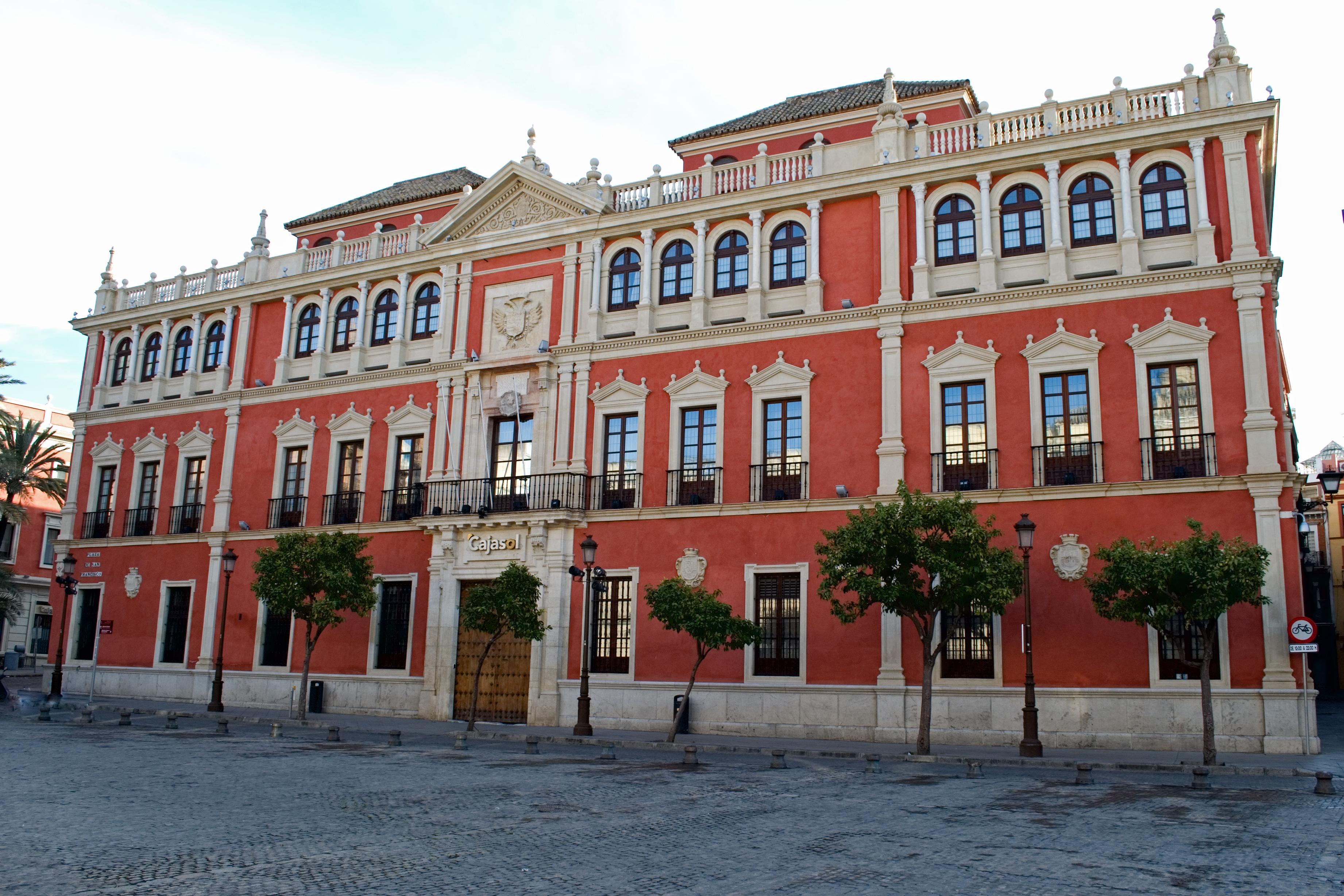 Edificio de la antigua Audiencia de Sevilla, actualmente sede central de la fundación Cajasol (Sevilla).